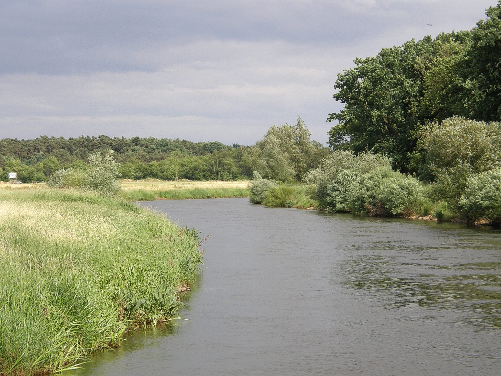 Die Aller bei Celle